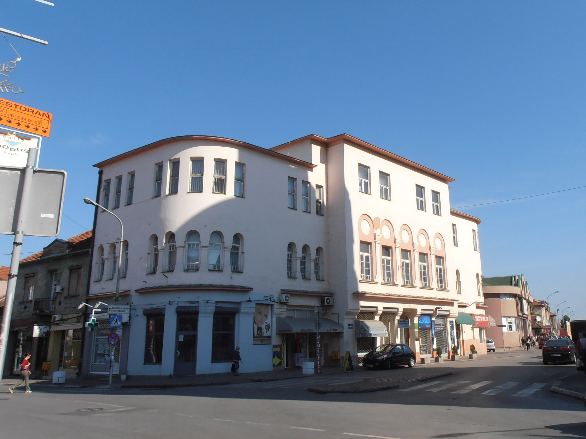 Zgrada Radnickog univerziteta u Jagodini, u ulici Maksima Gorkog 1